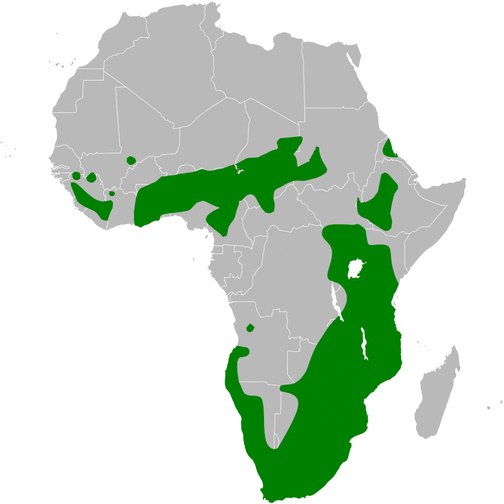 Ptyonoprogne fuligula distribution map, based on